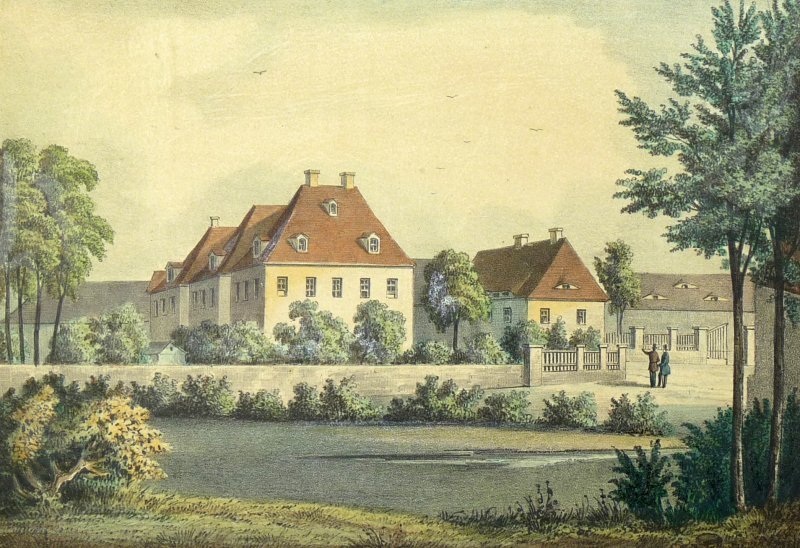 Herrenhaus und Rittergut Dallwitz bei Priestewitz aus aus: Gustav Adolf Pönicke; Album der Rittergüter und Schlösser im Königreiche Sachsen .... Section II: Meissnischer Kreis (Leipzig: Expedition des Albums Sächsischer Rittergüter und Schlösser 1856). - Unterhalb betitelt. Druck bei L. Blau & Co. in Leipzig.